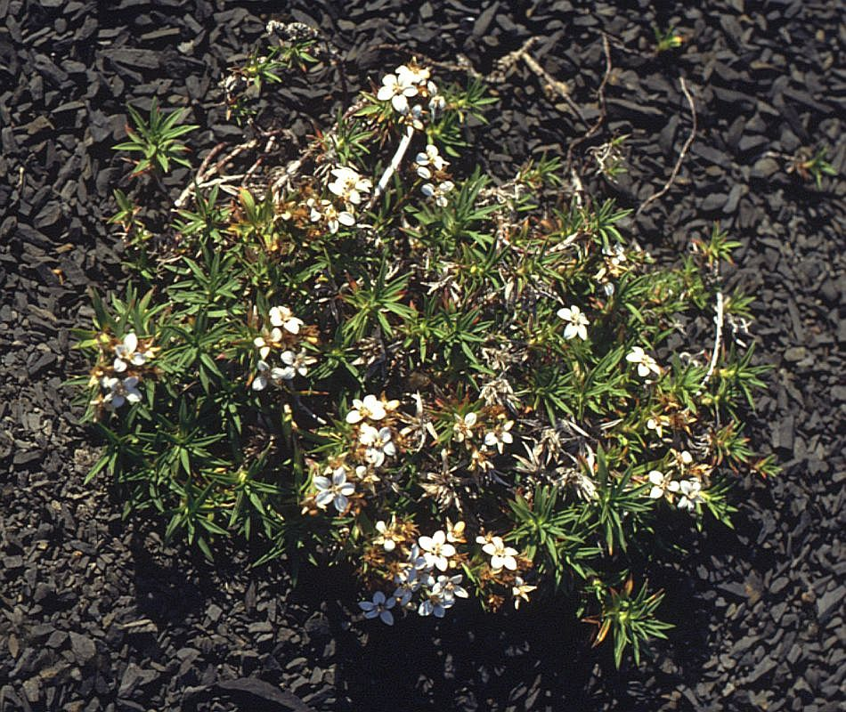 Nassauvia aculeata, (Asteraceae) - Chile, Patagonien/Patagonia, Parque Nacional Torres del Paine, N Posada Río Serrano